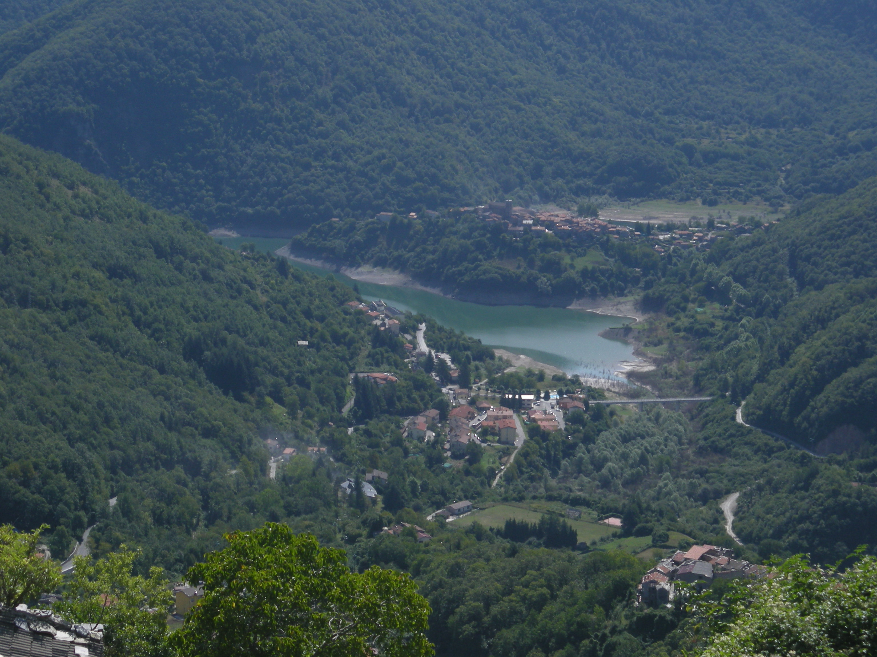 Lago di Vagli